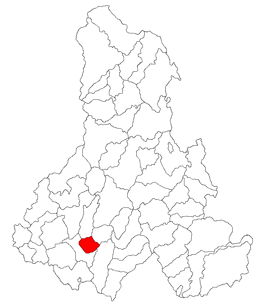 Categorie:Hărţi ale judeţului Harghita